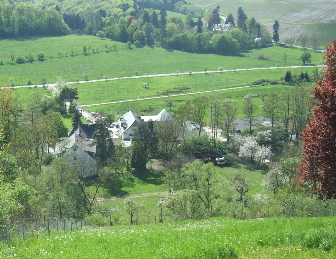 Karlsmuehle Mertesdorf/Ruwertal